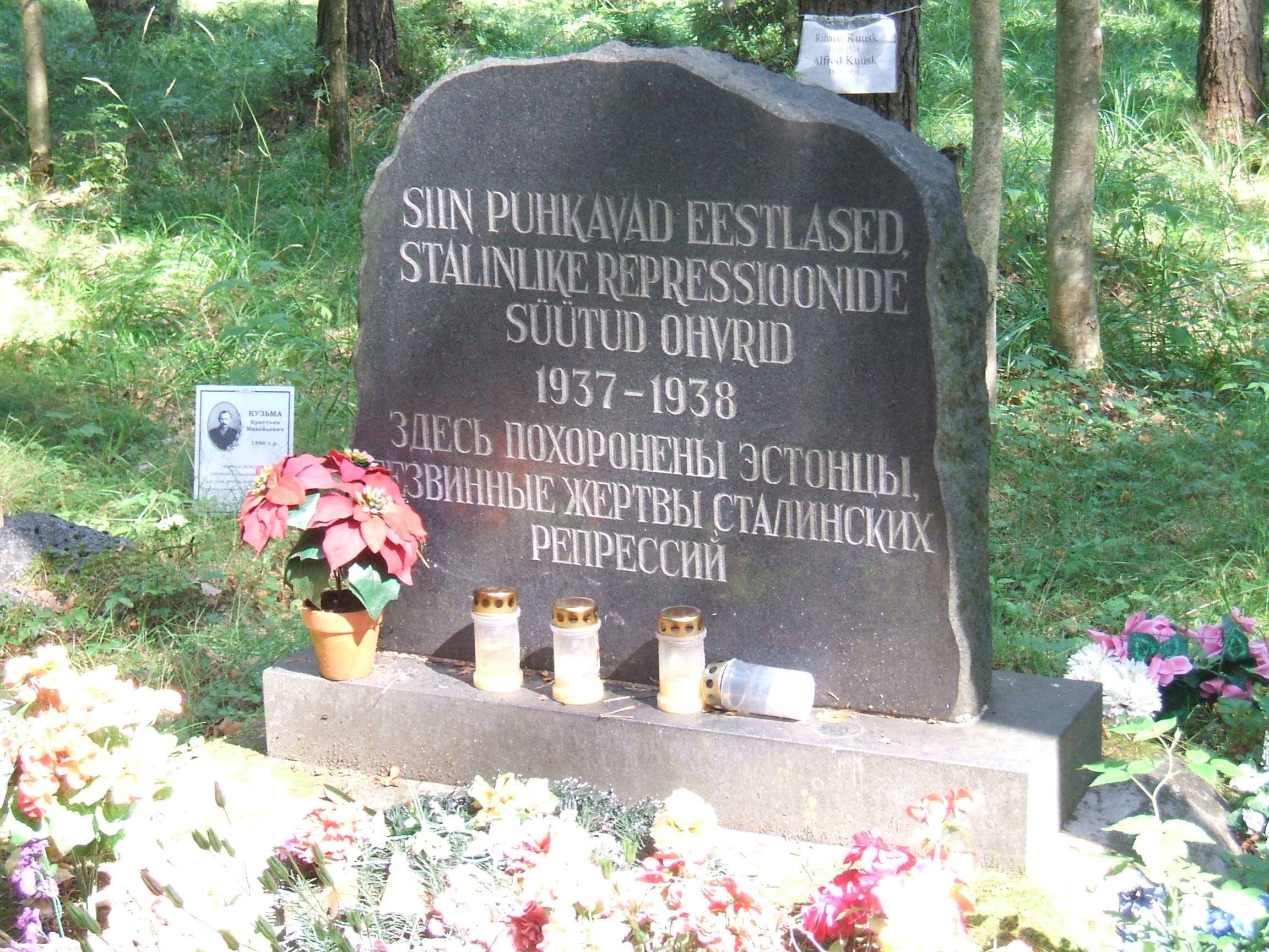 Памятники Левашовской пустоши